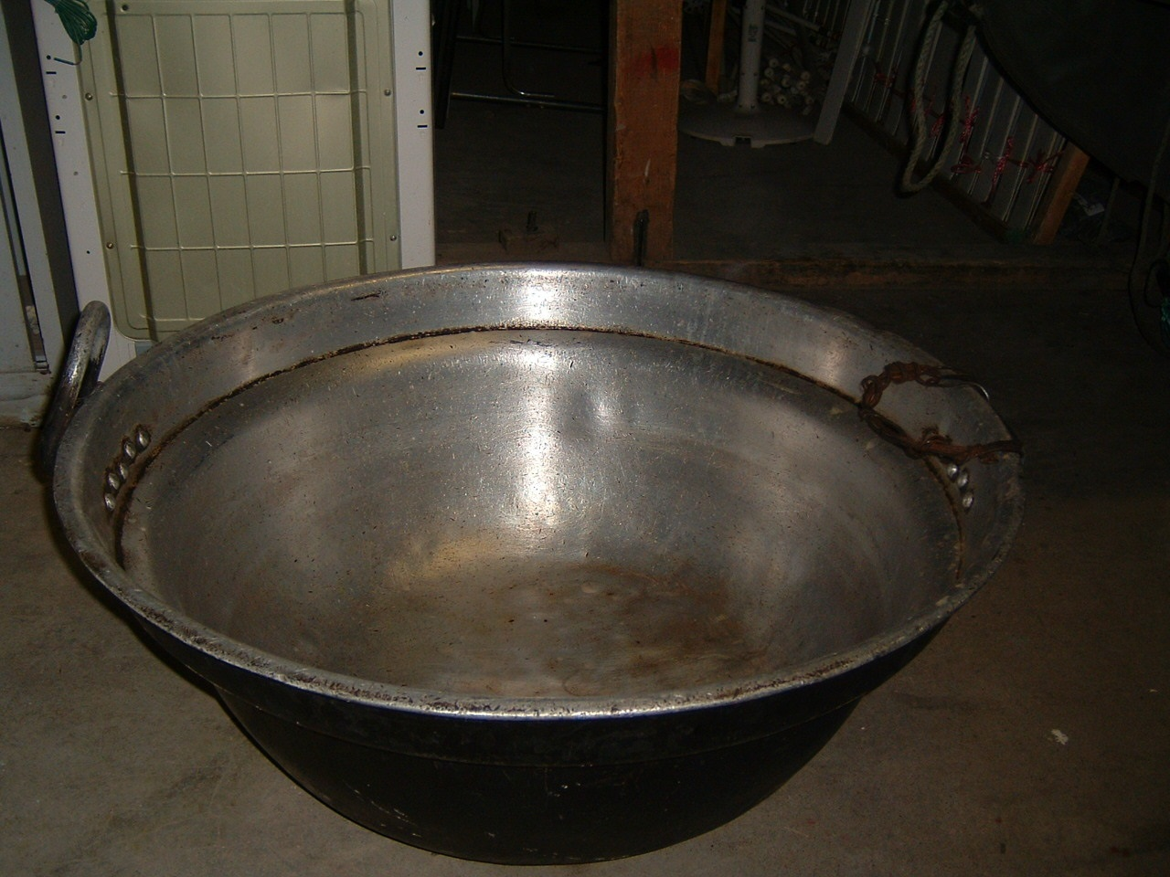 野外炊事で使用していた釜で補給・給養関係の係幹部をやってましたので撮影する機会ができたときの写真です。